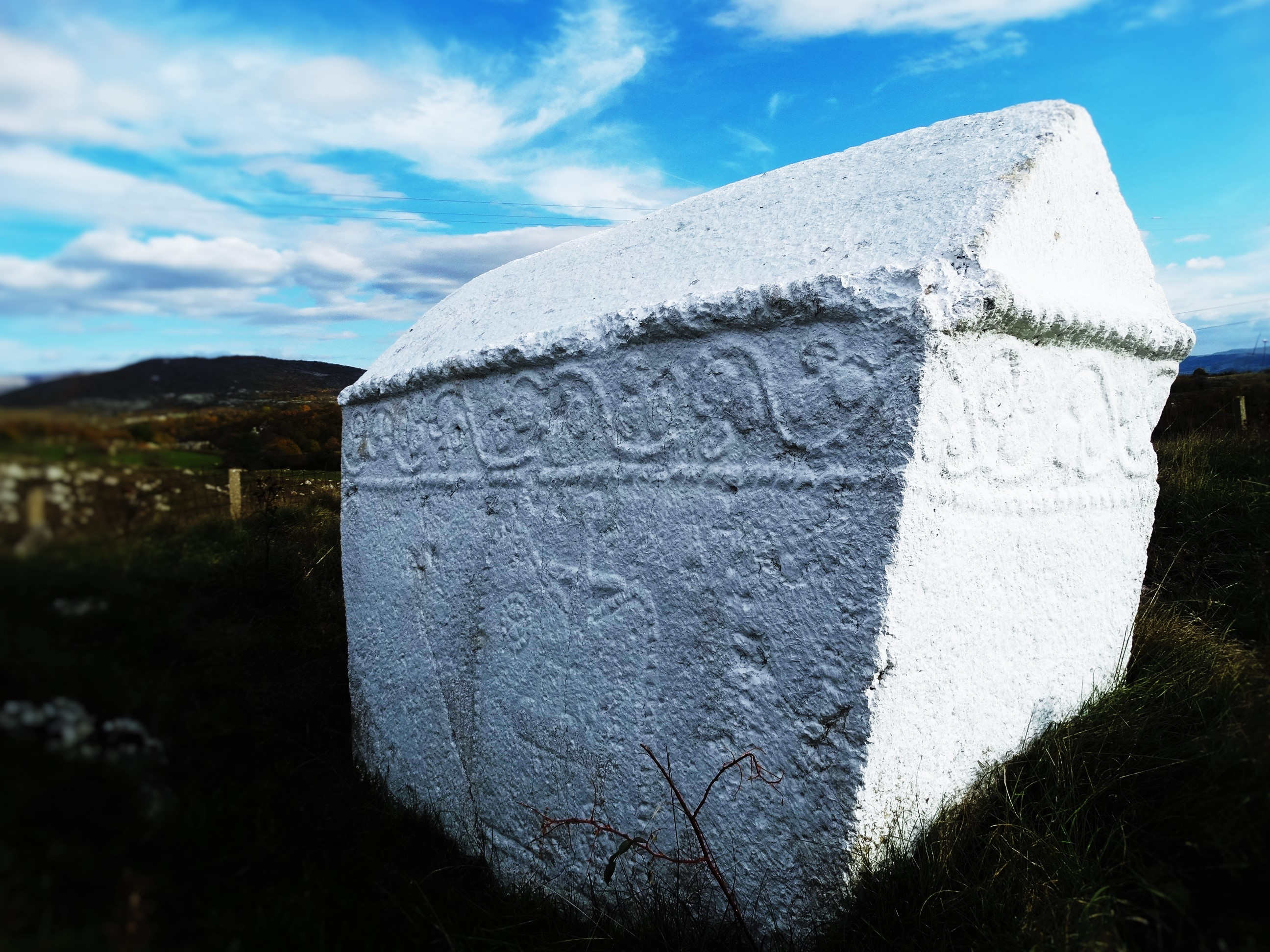 Područje opštine Nevesinje ima 117 nekropola sa ukupno 4.109 stećaka. Oblici stećaka u nevesinjskim nekropolama su ploče (39%), oblici sanduka (56%), sljemenici (4%) i krstače (0.8%). Pravljeni su od kamena krečnjaka boljeg kvaliteta, kojeg ima u izobilju u neposrednoj blizini. Prema očuvanim natpisima i karakteristikama, Nevesinjski stećci potiču iz perioda s kraja XIII do početka XVI vijeka. Mnogi se nalaze izmješani sa sadašnjim grobovima i spomenicima u njima. Najveća nekropola stećaka (452 stećka) u BiH nalazi se u selu Krekovi (zaseok Mijatovci, lokalitet “Kalufi“), 10 km udaljeno od centra grada. Sa ovoga lokaliteta 1960. godine kao izuzetne primjerke, dva stećka oblika sanduka, odvezena su u Vojni muzej na Kalemegdanu u Beograd gdje su i danas izloženi. NKD481